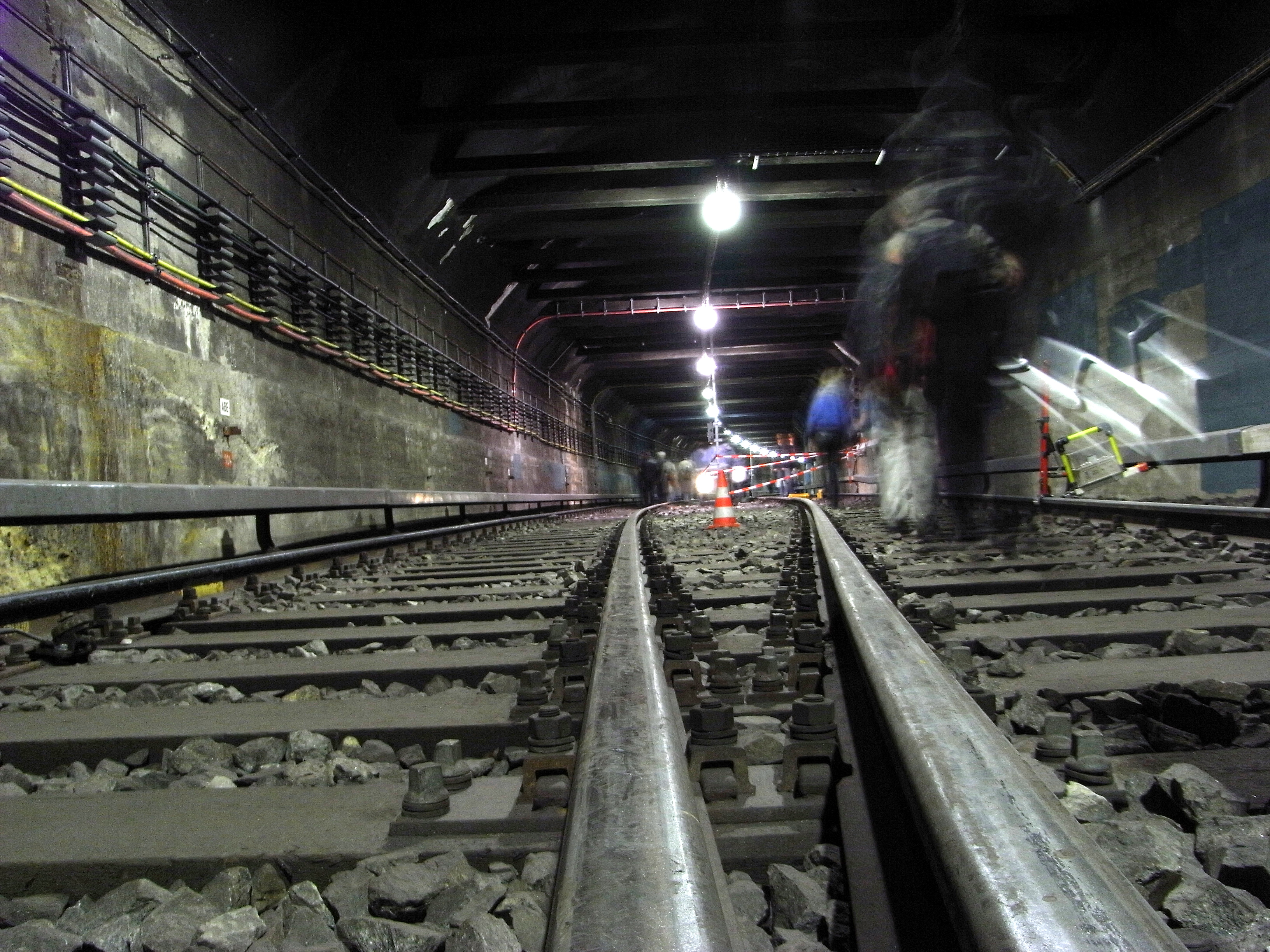 Zweigleisiger Teil des Waisentunnels am "Tag des offenen Denkmals"